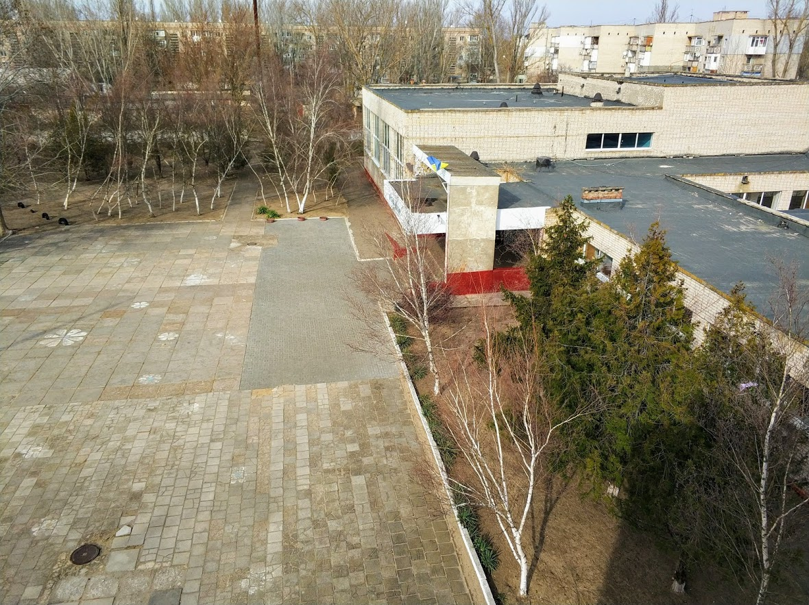 парадний вхід до Олеківській спеціалізованій школі І-ІІІ ступенів №4